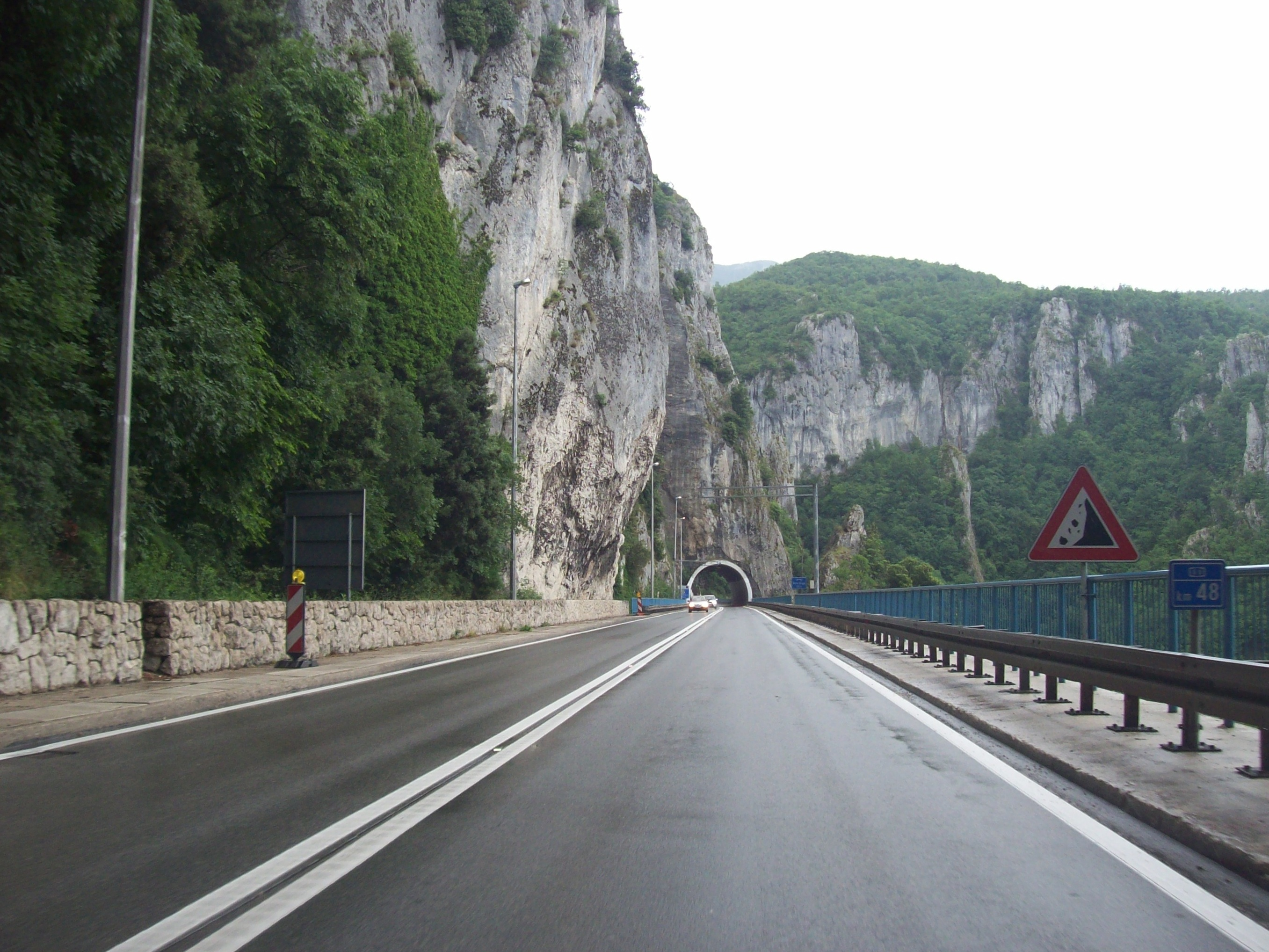 Učka tunnel - Vela Draga bridge